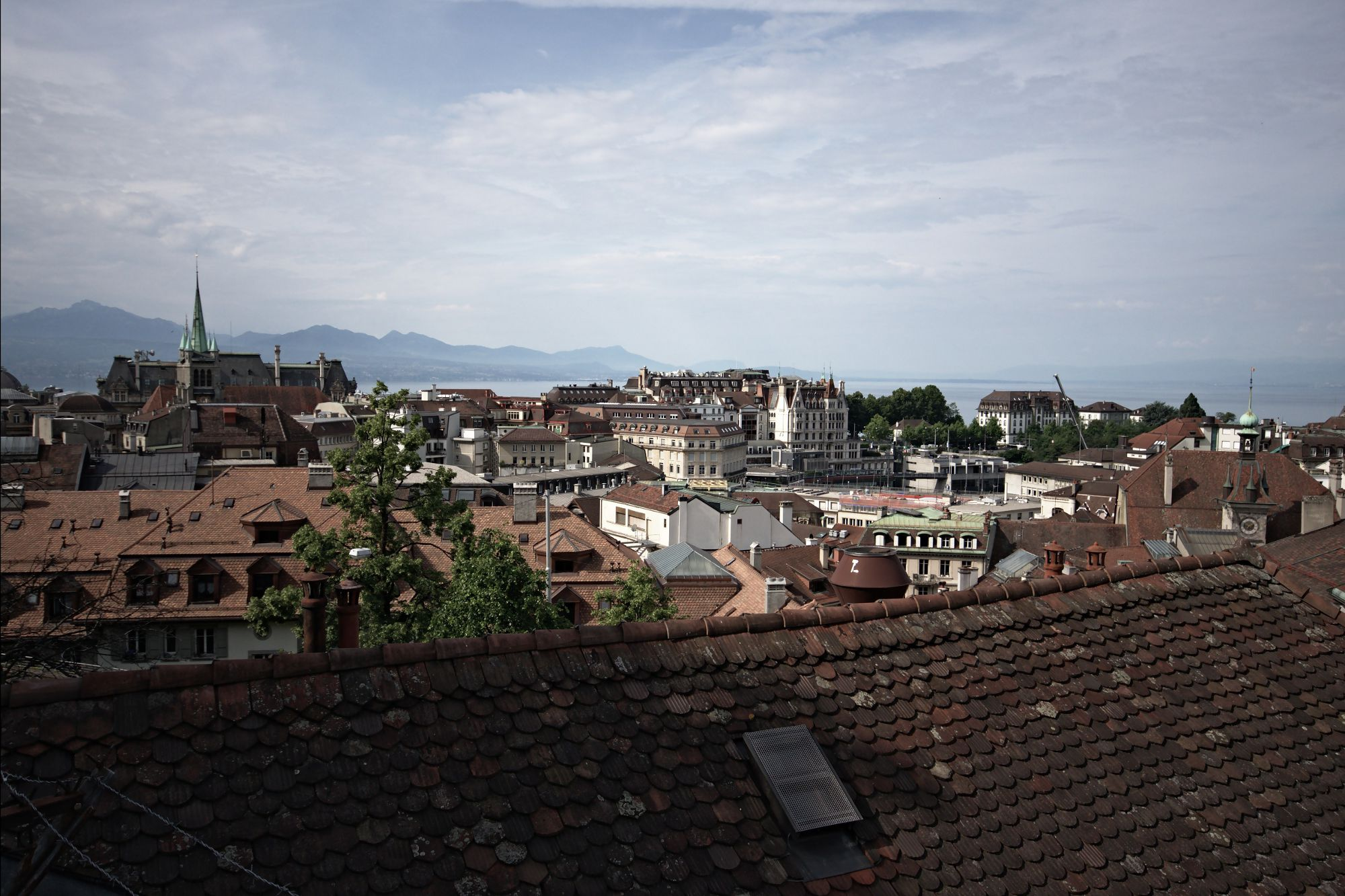 Vue sur la ville de Lausanne, prise depuis la place de la Cathédrale